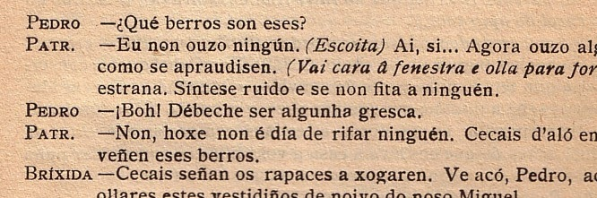 Catuxa de Houlihan, 1935 (Cathleen ni Houlihan, 1902), detail.